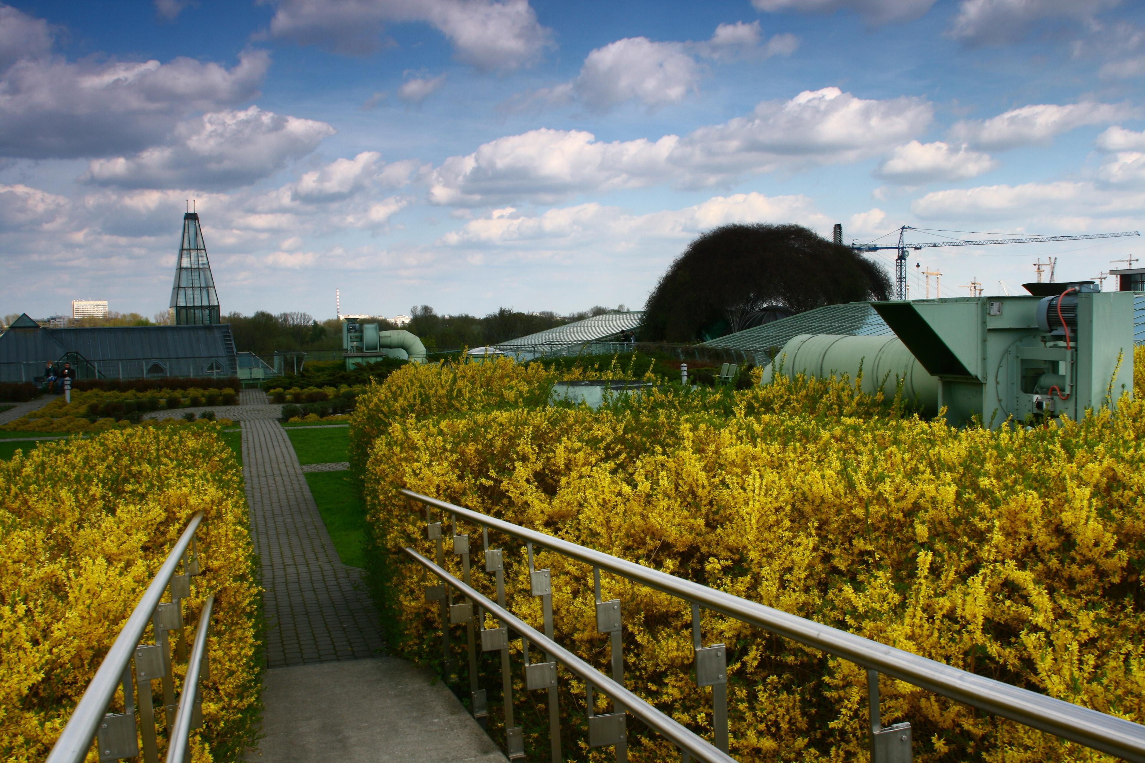 Powiśle, Warsaw, Poland